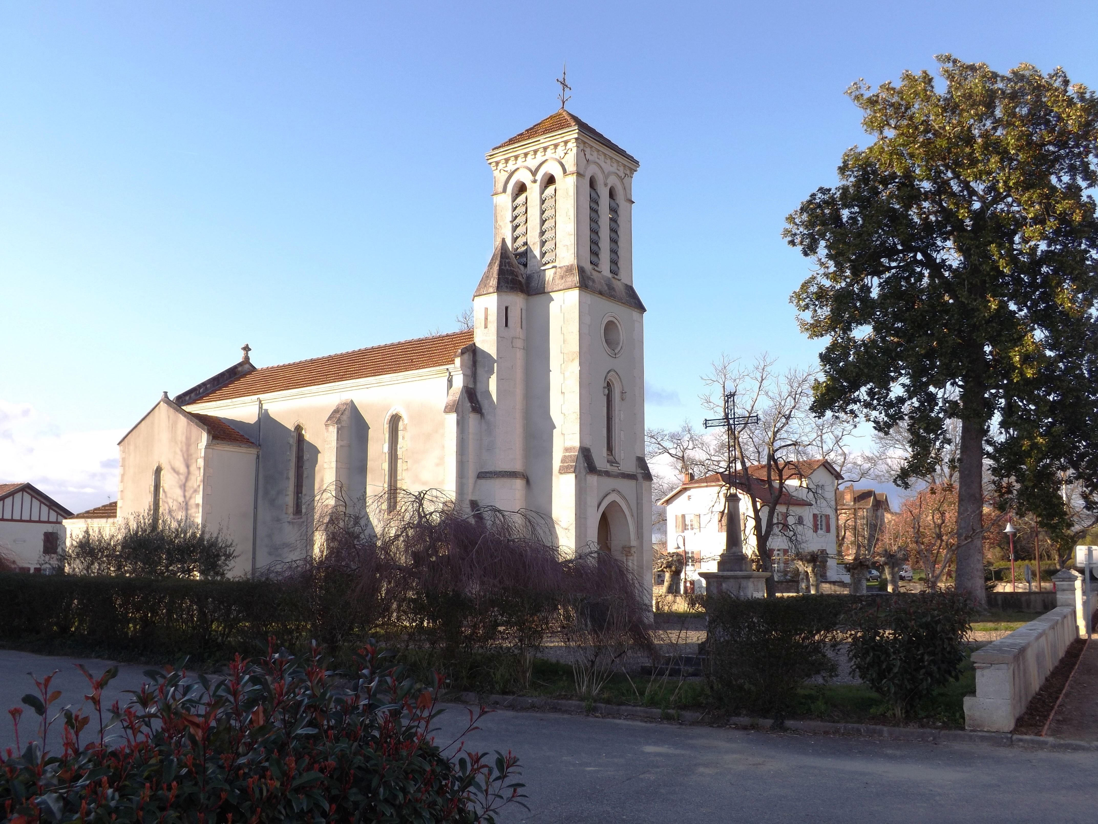 Eglise de Saint-Geours-d'Auribat, Landes, France